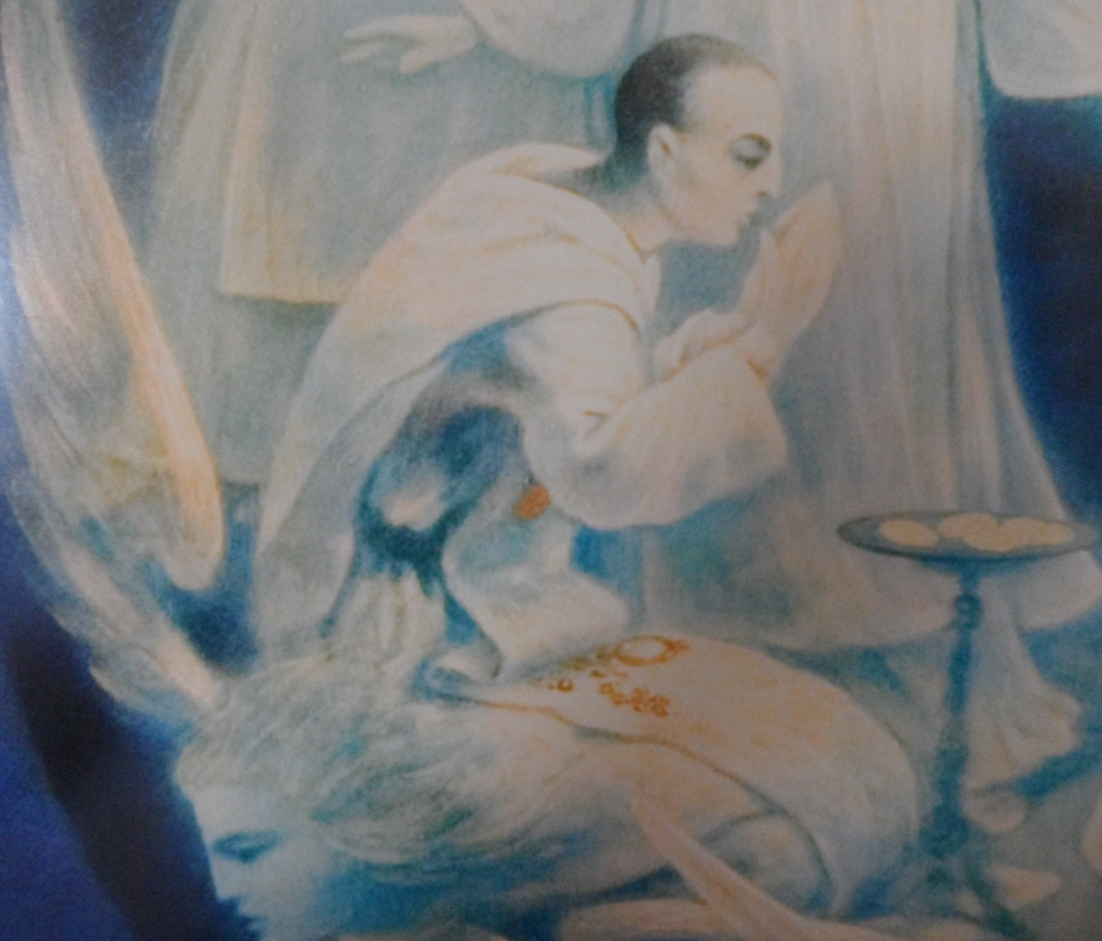 Particular del lienzo de Mariano de San José y Compañeros mártires trinitarios. Convento de San Carlino alle Quattro Fontane. Roma.